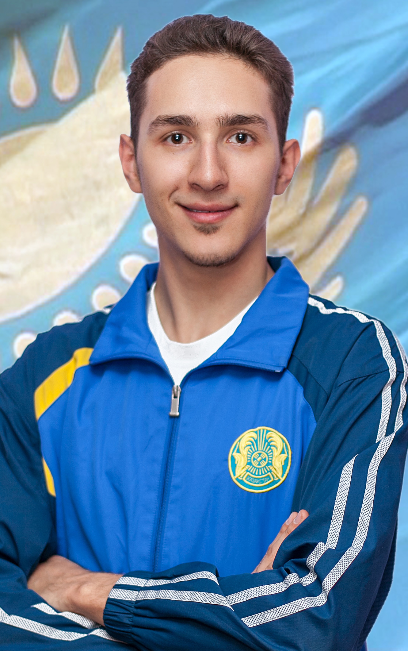 Алимжанов Эльмир - фехтовальщик из Казахстана